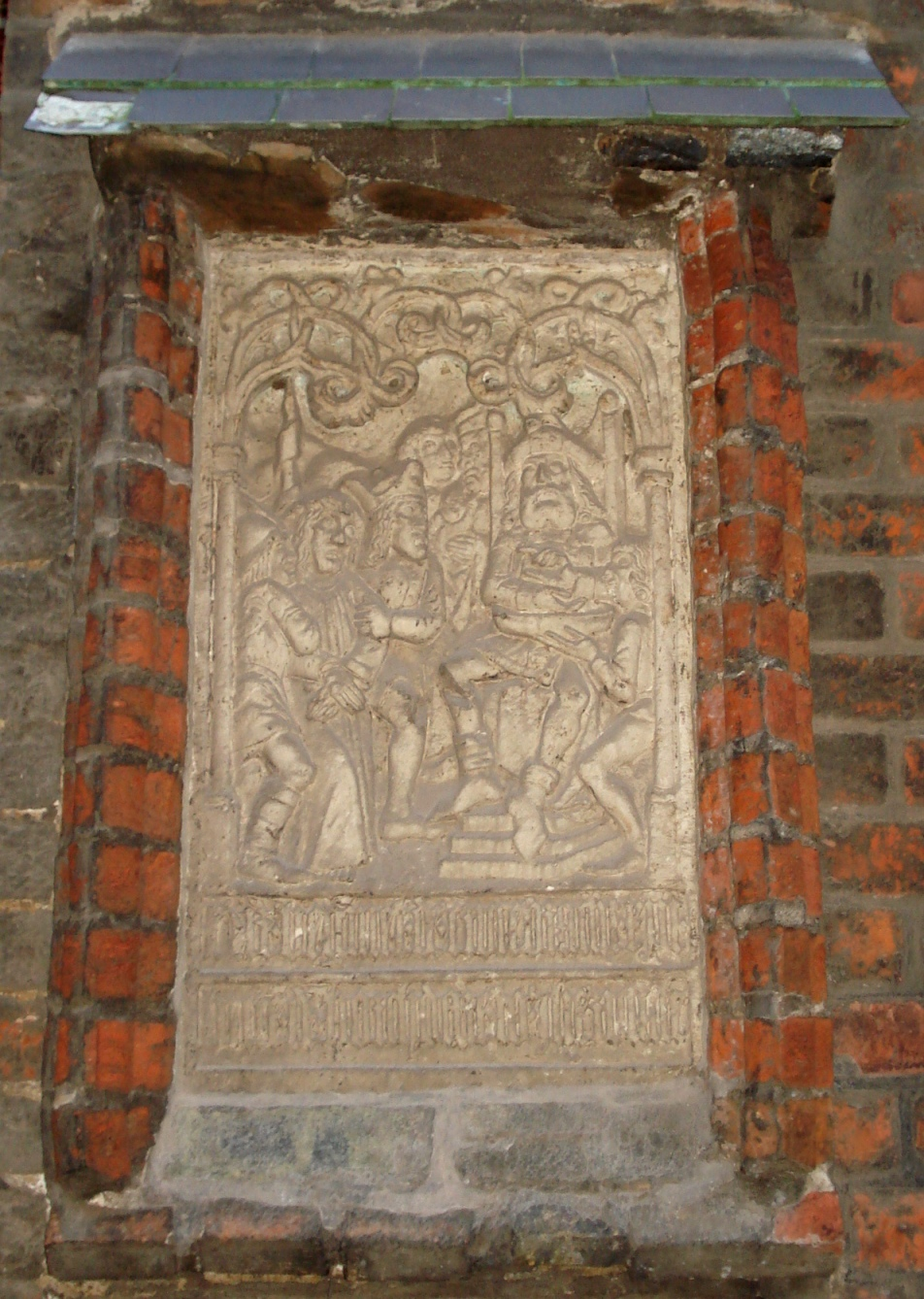 Erste Station des Lübecker Kreuzweges